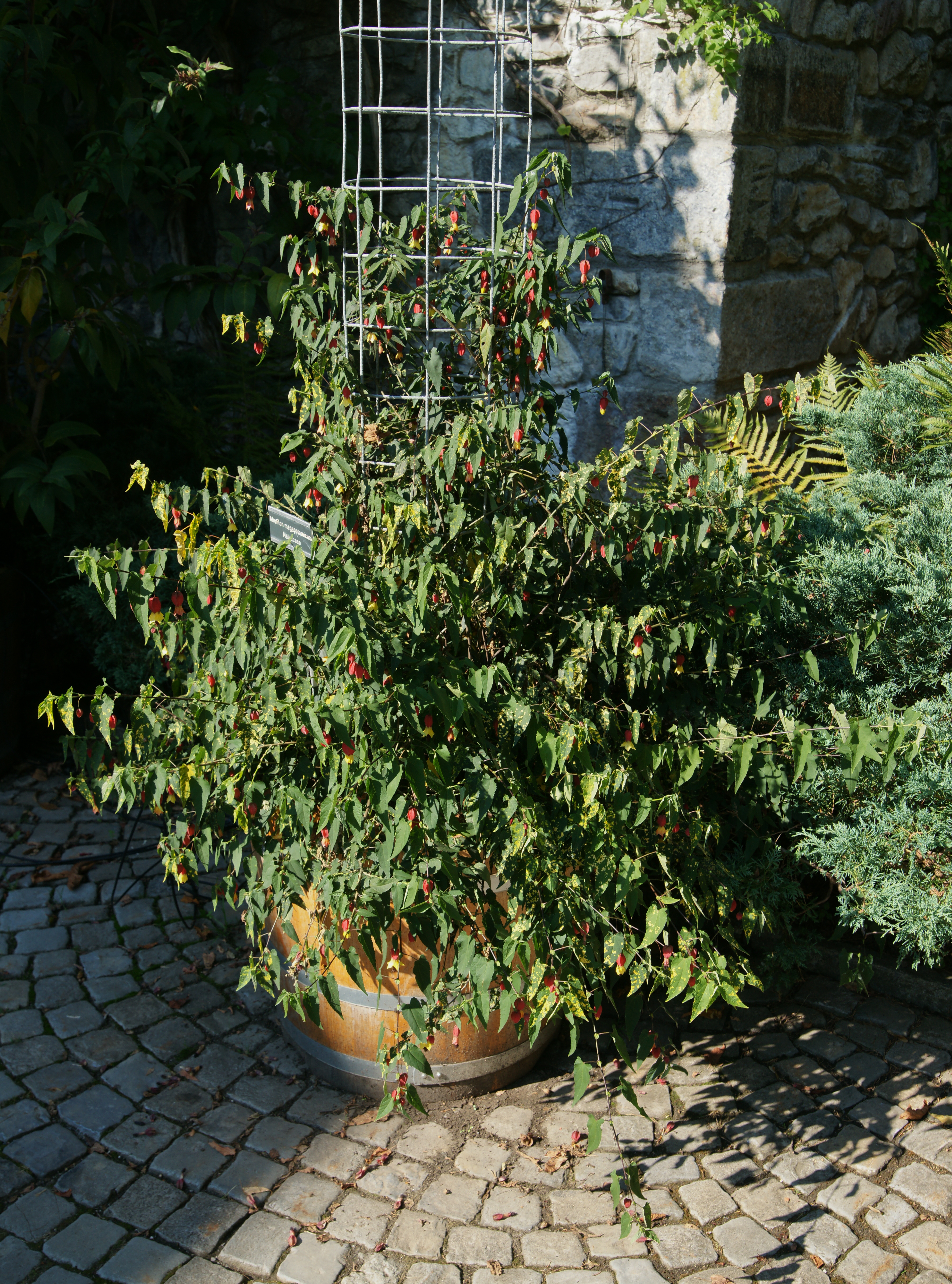 Abutilon megapotamicum. Elfenaupark Bern.